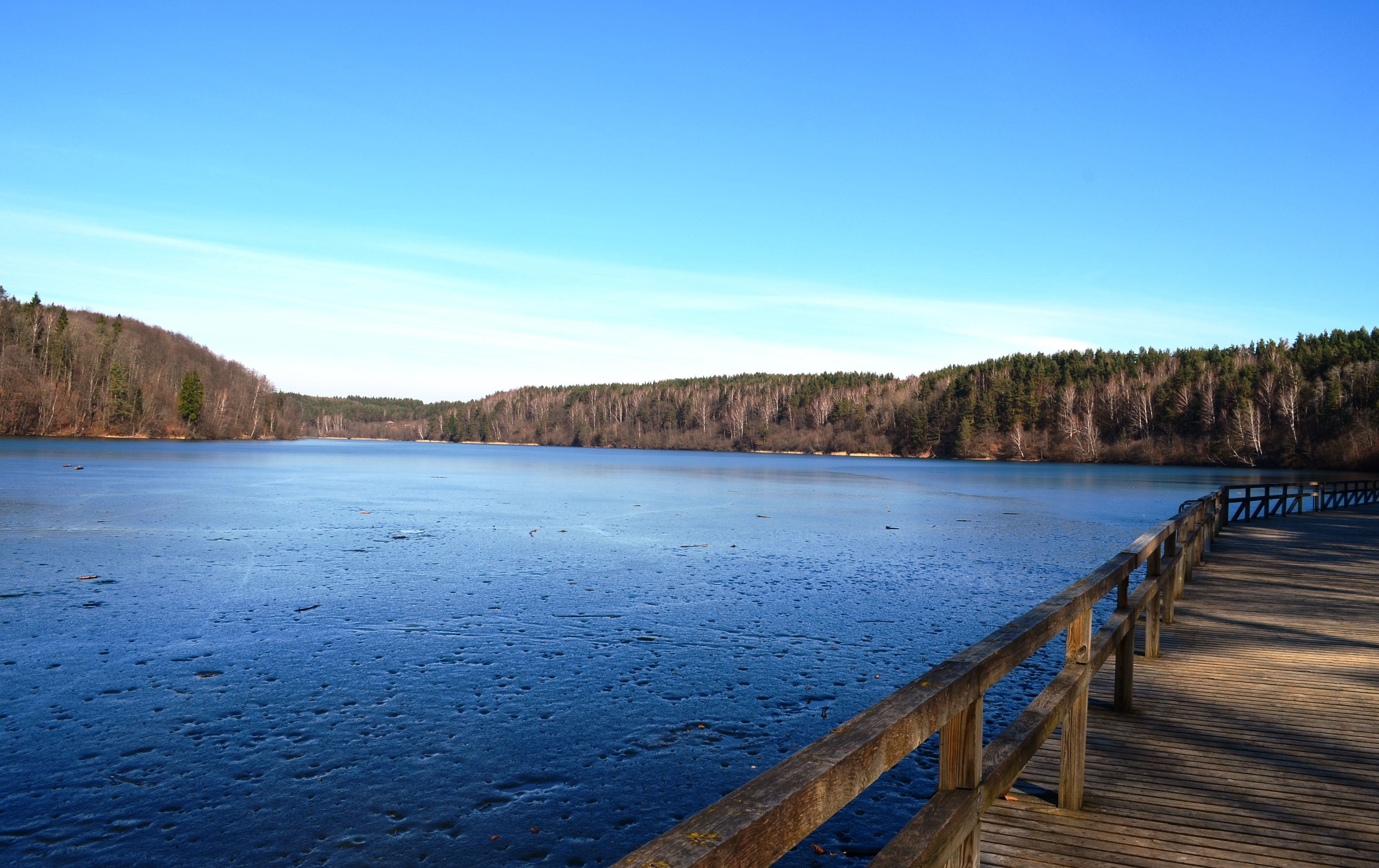 Balsio ežeras, Vilnius